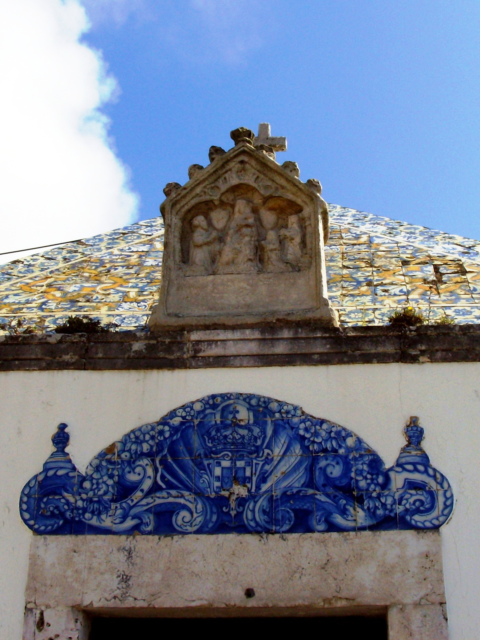 Ermida da Memória, sítio da Nazaré, vila e concelho da Nazaré, distrito de Leiria, Portugal: porta (detalhe).